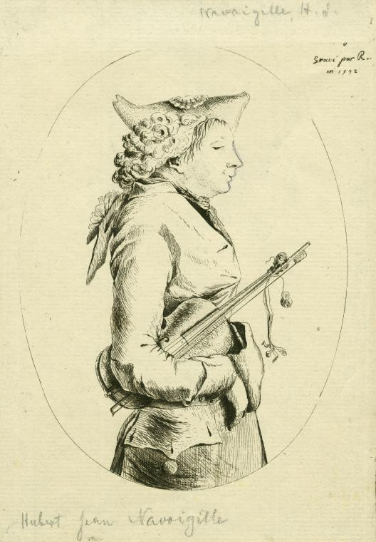 Dessin de Julien Navoigille de 1792